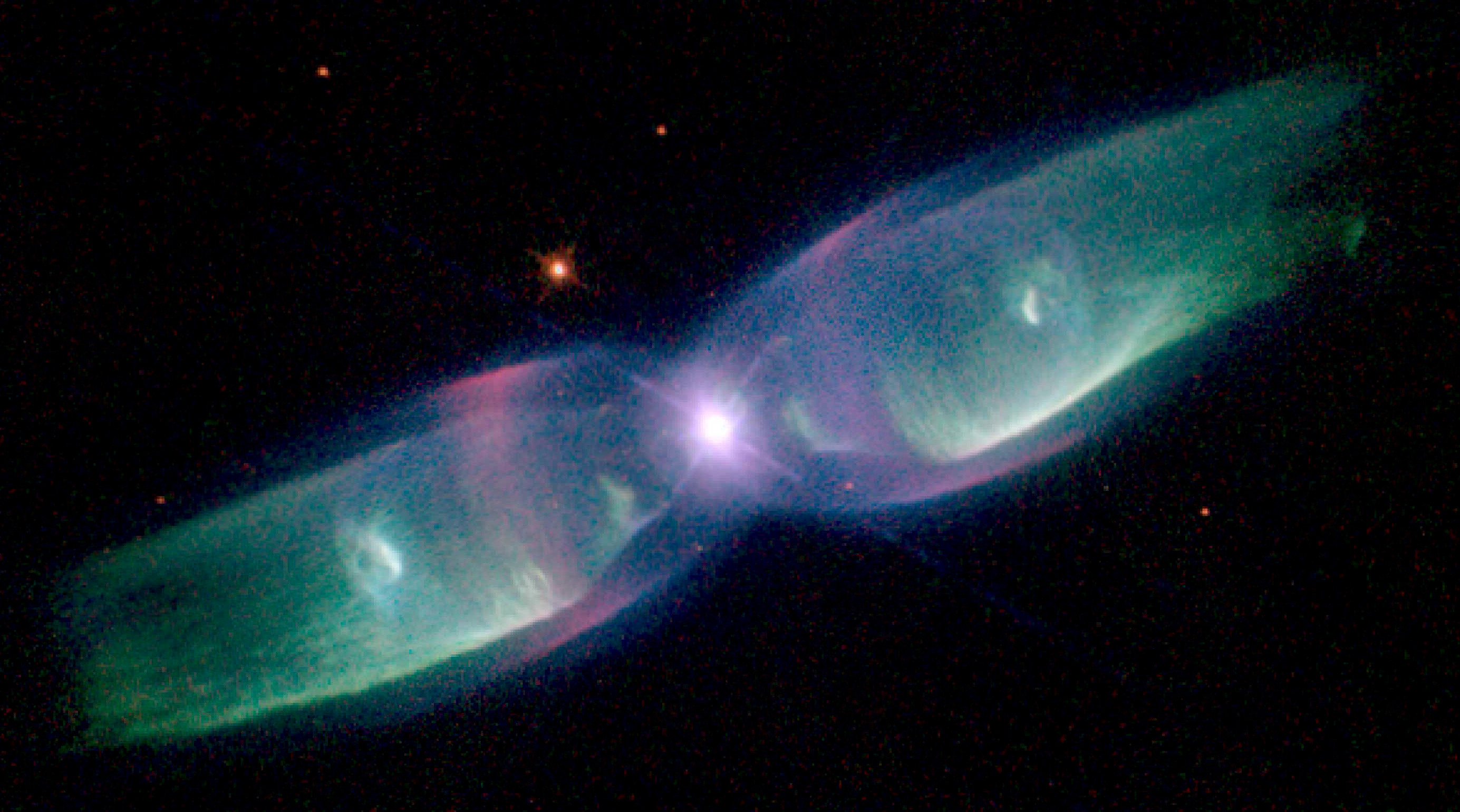 Planetary nebula M2-9.